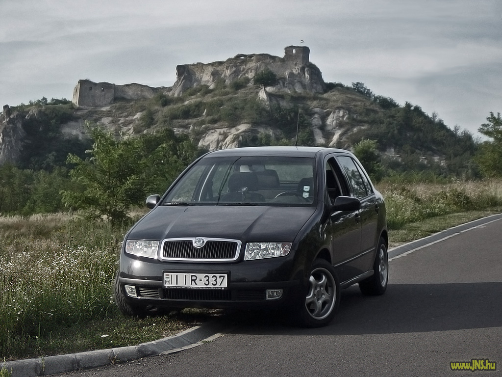 Siroki vár